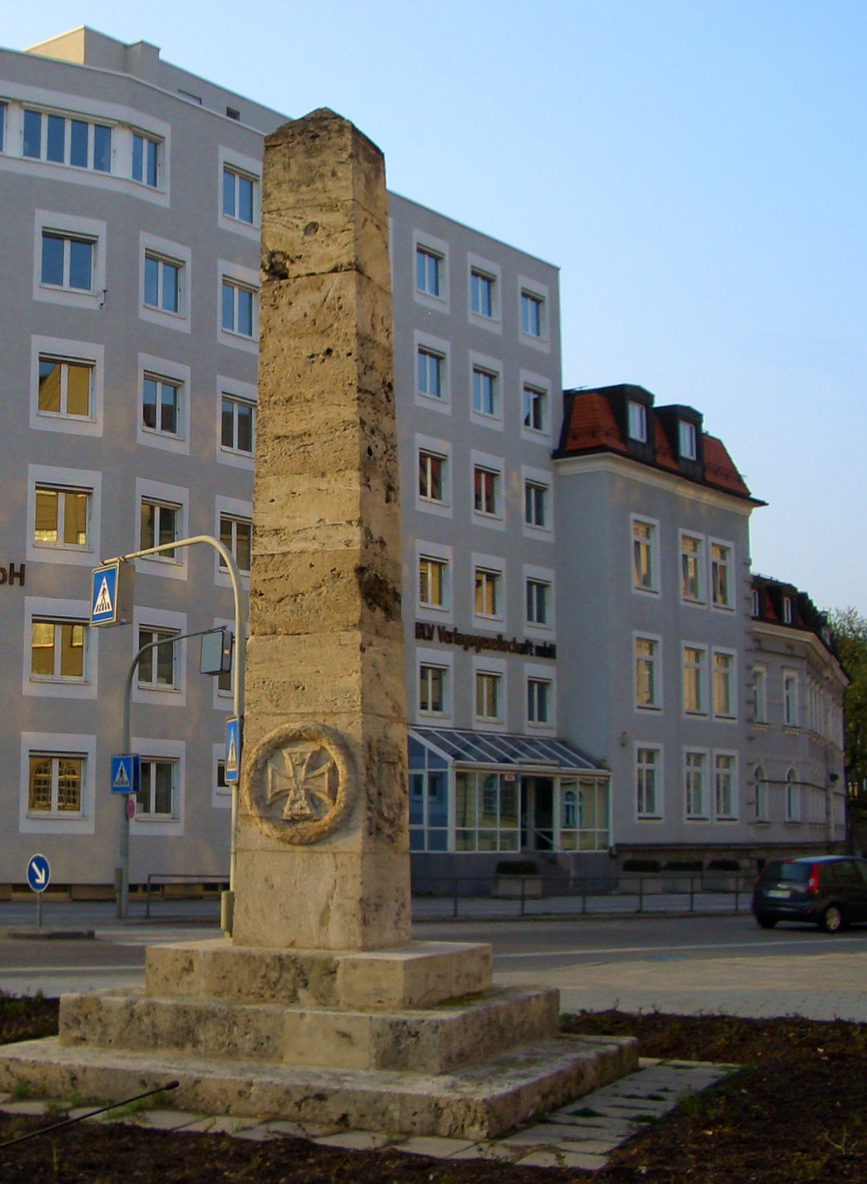 Obelisk für das 2. Bayerische Infanterieregiment in München